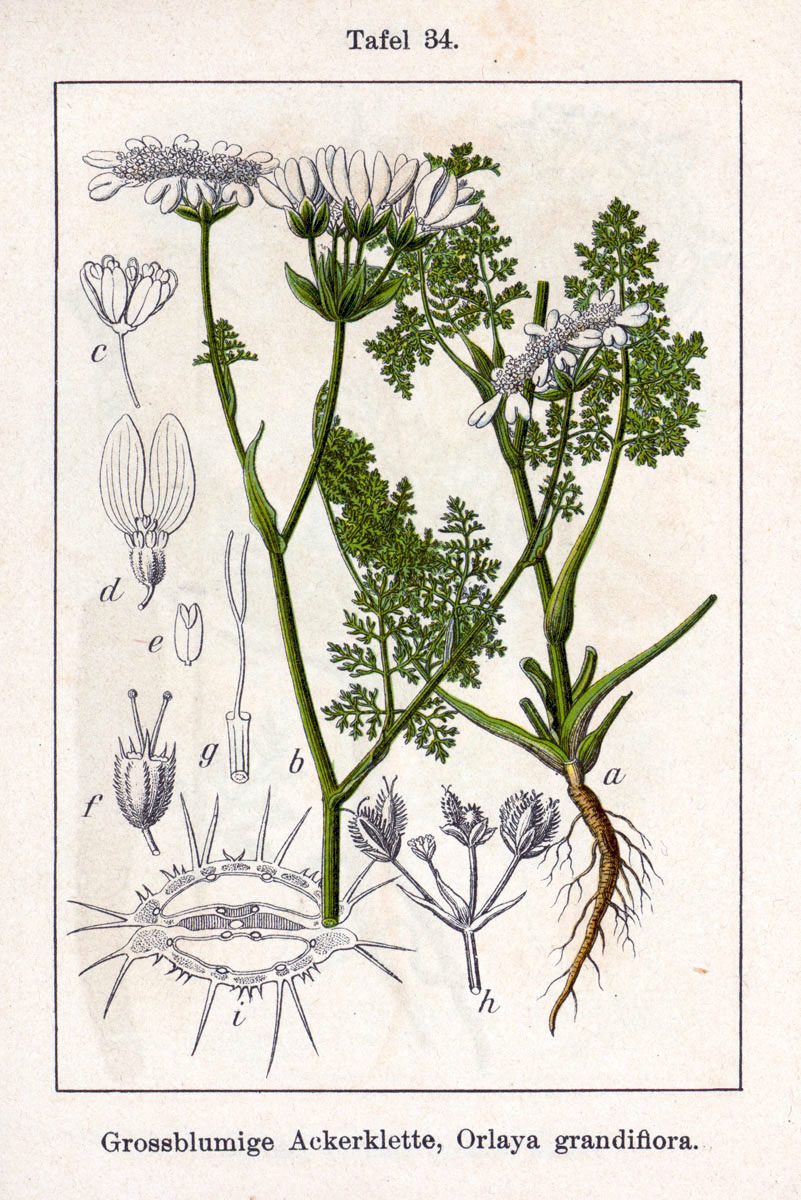 Orlaya grandiflora (L.) Hoffm. Original Description Grossblumige Ackerklette, Orlaya grandiflora